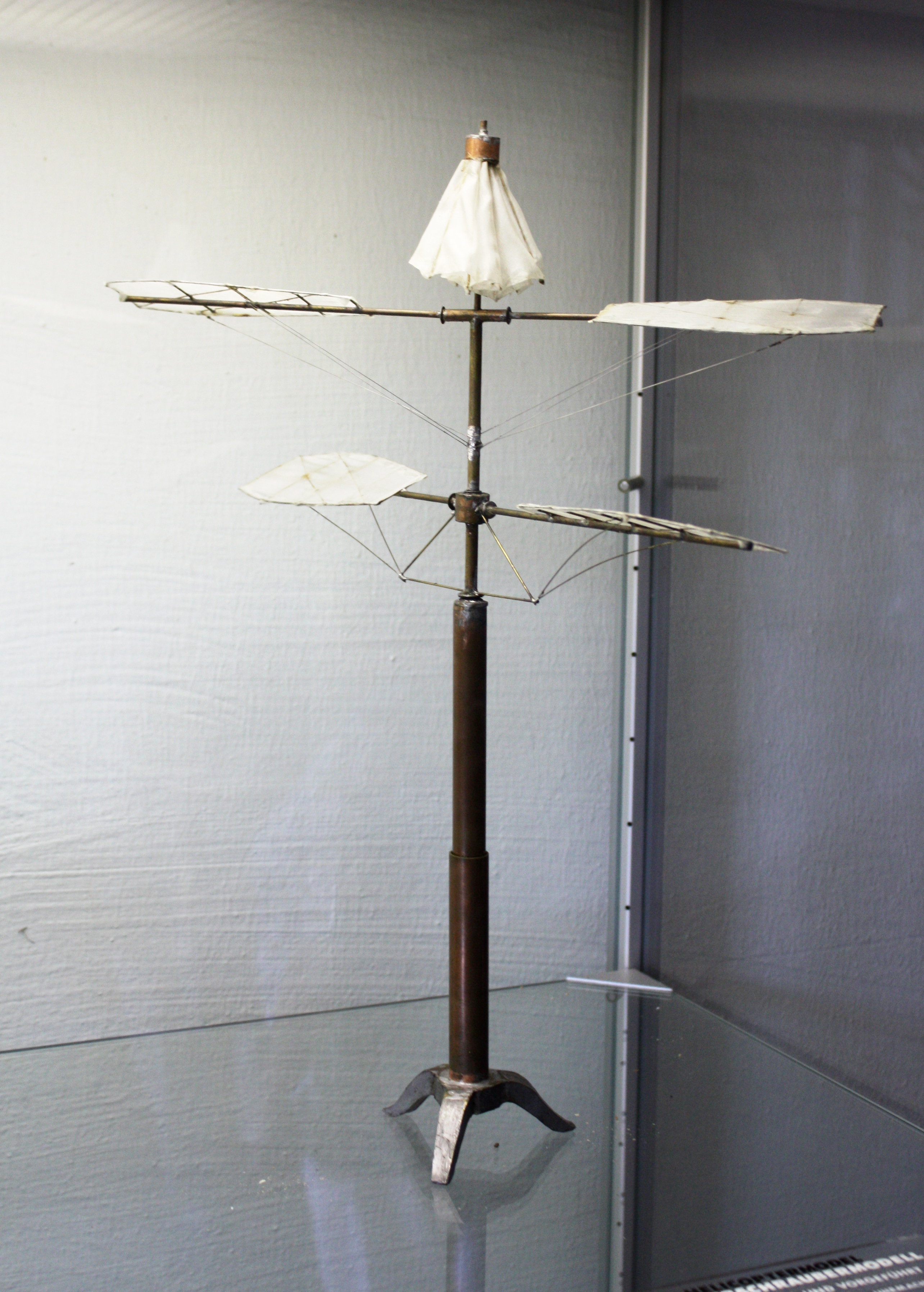 Hubschraubermuseum Bückeburg; Beschreibung: Hubschraubermodell - 1817 gebaut und vorgeführt von Jakob Degen (1760-1848) - Uhrmacher in Wien